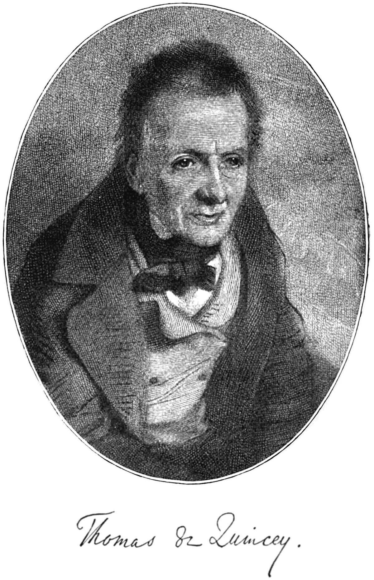 Thomas de Quincey